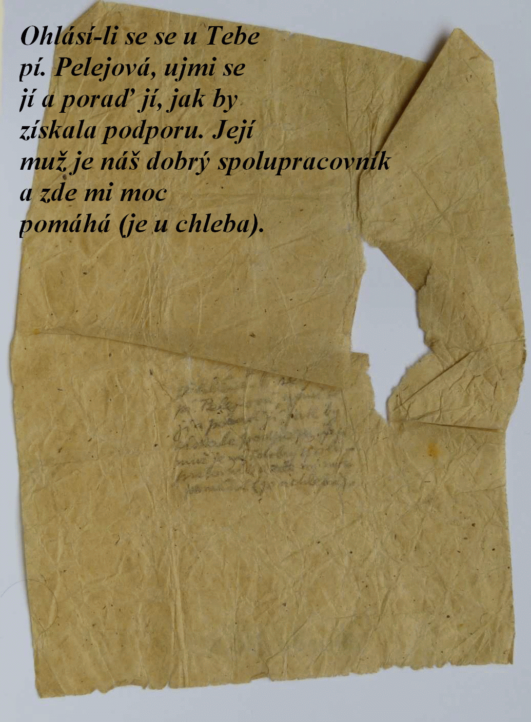 Zprávy rodině o průběhu vyšetřování, podmínkách věznění, svých nadějích a přáních pašoval vězněný plukovník Josef Churavý za zdi pankrácké věznice v Praze (zde byl vězněn nacisty od konce roku 1941 do června 1942) pomocí motáků ukrytých ve špinavých kapesnících. Toto je ukázka jednoho z „dopisů“ (motáků), psaných měkkou tužkou, který byl doručen rodině a zachoval se. Jeho datování se nepodařilo zjistit. (Josef Pelej byl zatčen gestapem 18. prosince 1941, popraven na Kobyliské střelnici v Praze 30. června 1942). Text zprávy: „Ohlásí-li se se u Tebe pí. Pelejová, ujmi se jí a poraď jí, jak by získala podporu. Její muž je náš dobrý spolupracovník a zde mi moc pomáhá (je u chleba).“